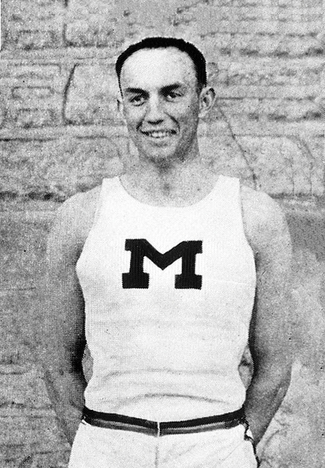 Brutus Hamilton